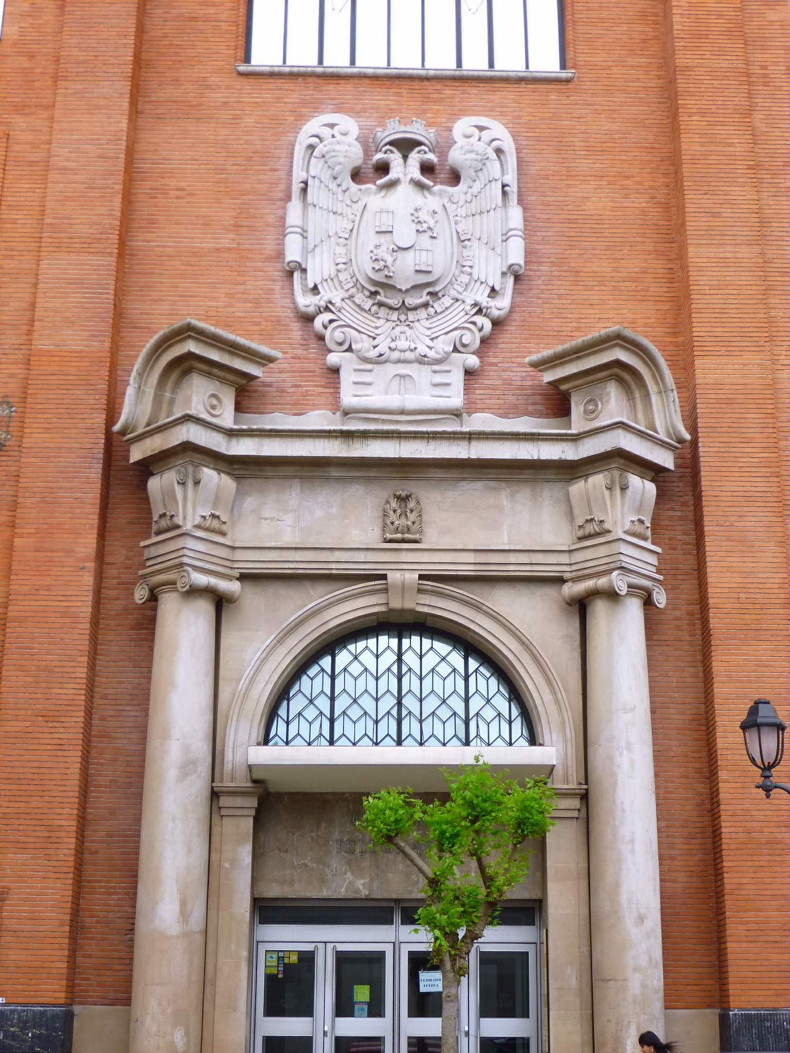 Edificio de Correos y Telégrafos (Bilbao)